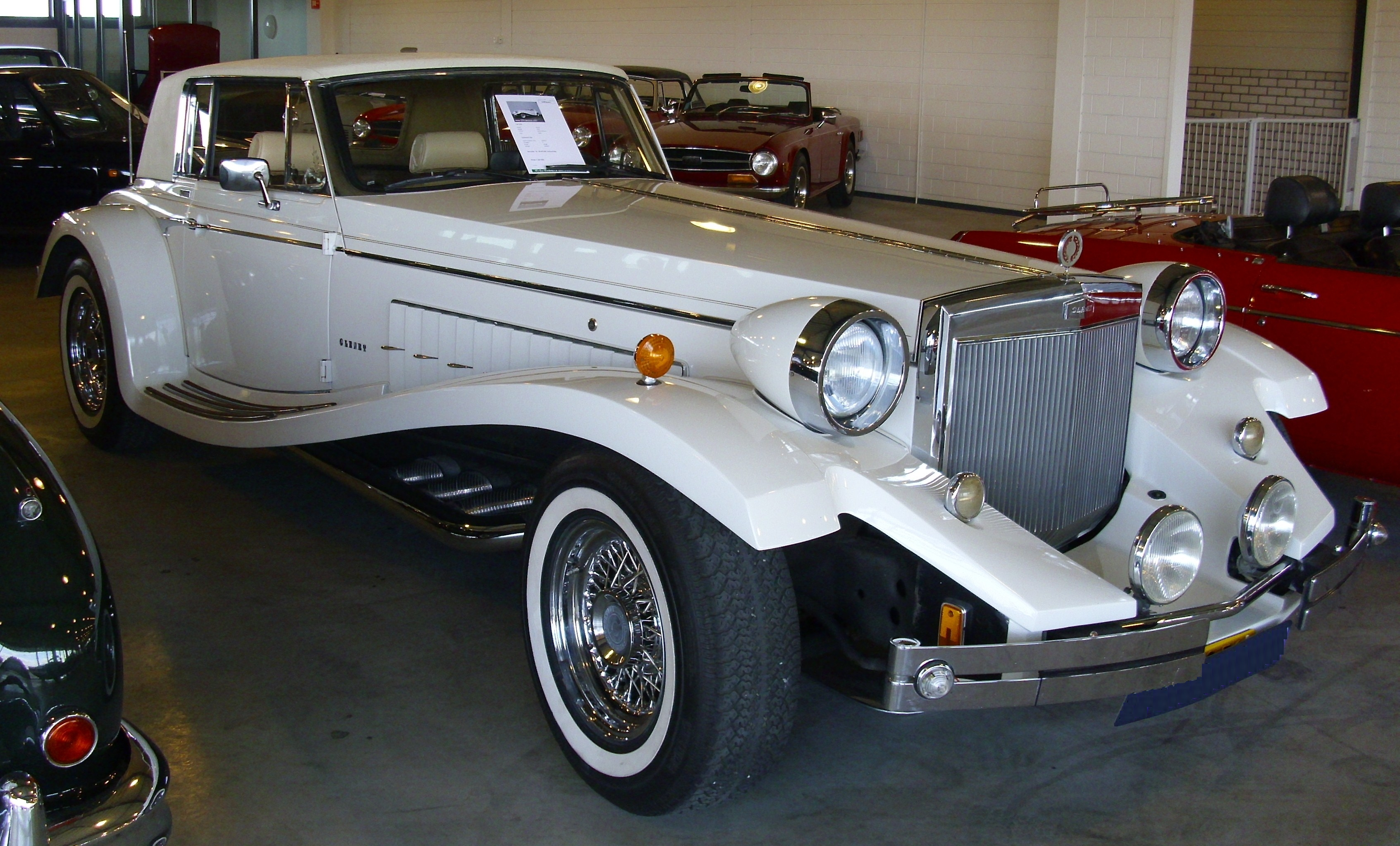 Clénet Series III Asha Coupe von 1982